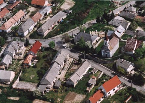 Szentjakabfa, Hungary